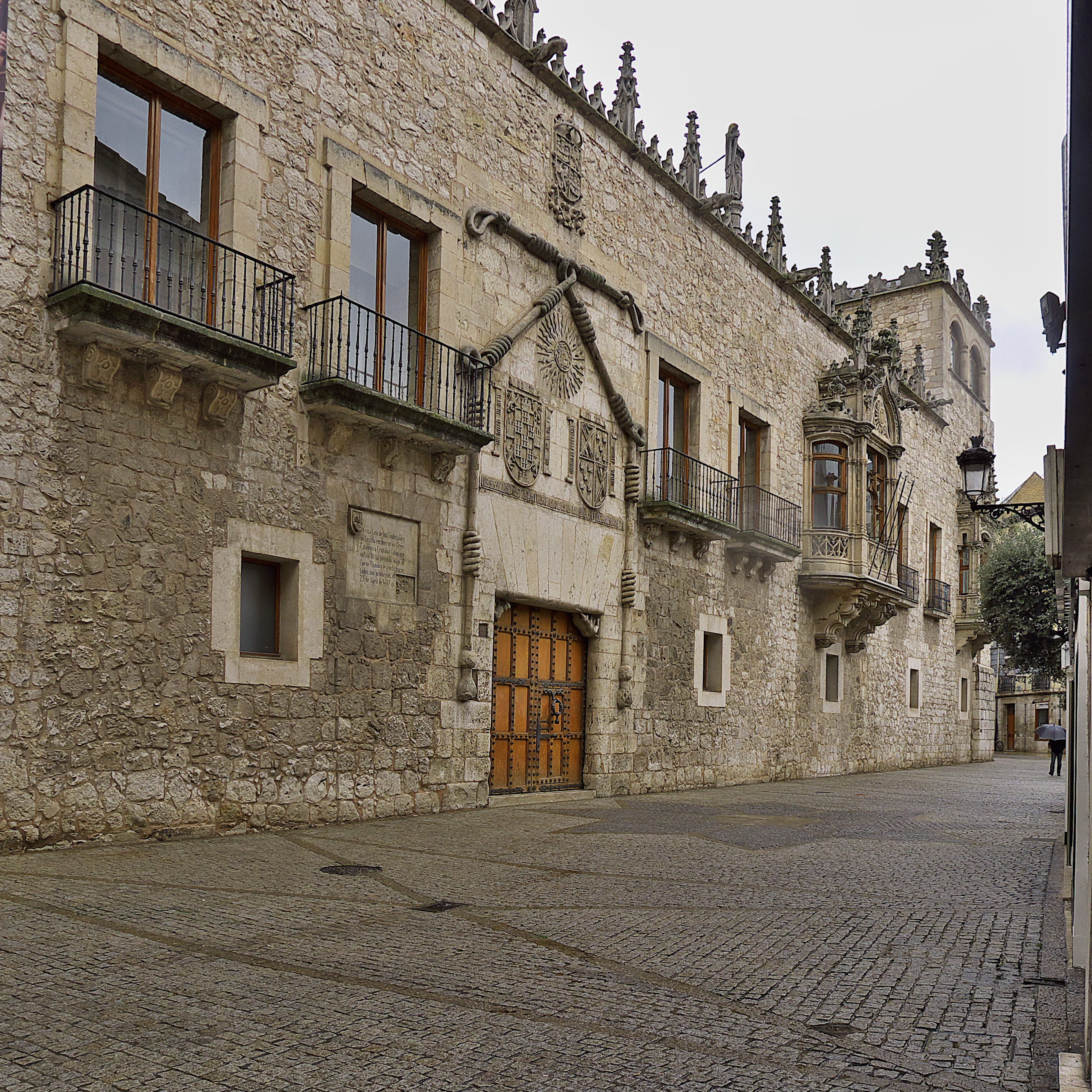 Palacio de Pedro Fernández de Velasco y Manrique de Lara, Condestable de Castilla, proyectado por Juan de Colonia (1476).